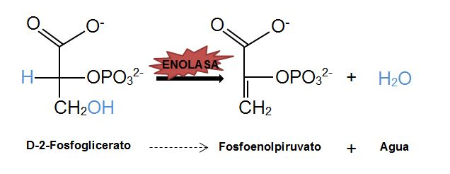 Reacción de deshidratación de la enolasa